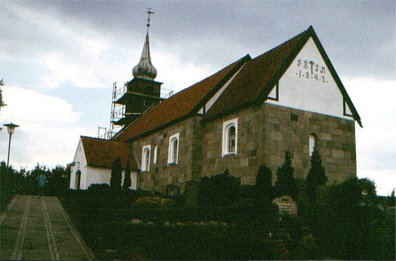 Fiskbæk Kirke set fra sydøst, Viborg Kommune, Jylland, Denmark